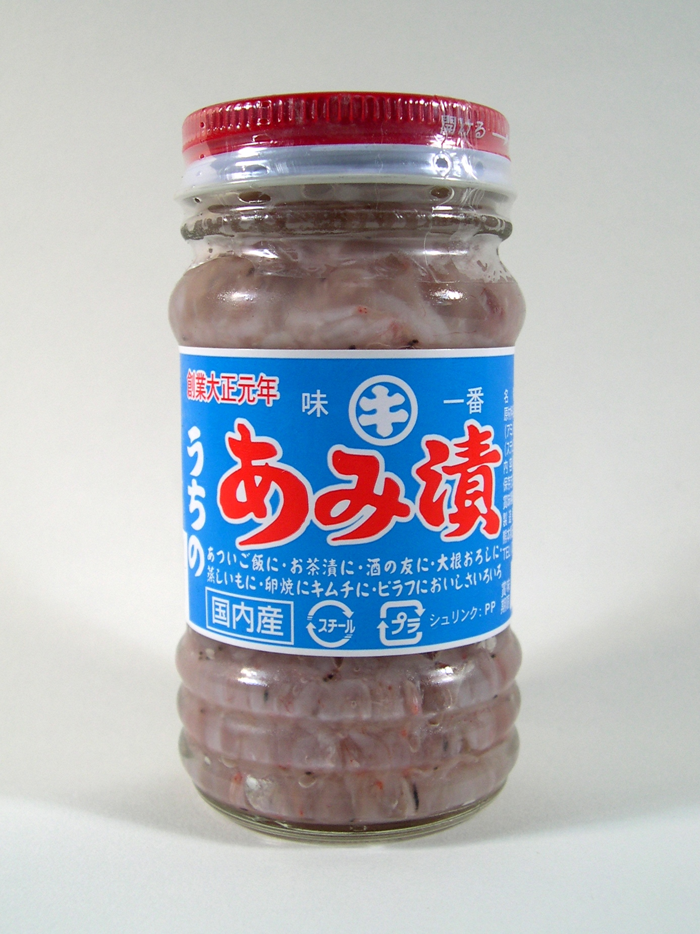 アキアミ Acetes japonicus （サクラエビ科）の瓶詰め 創業大正元年 有明じまん うちの 「あみ漬」 名称 / あみ漬 原材料名 / アミ（国内産）、食塩、調味料（アミノ酸等）、酒精、ソルビット、甘味料（ステビア、甘草） 内容量 / 130g 保存方法 / 10℃以下で保存 賞味期限 / 2011年5月2日 製造者 / 内野海産株式会社 （熊本県玉名郡長洲町） ビンの高さ（蓋を含む） / 99.5mm ビンの直径（中央の最も細い部分） / 48.5mm ビンの直径（リング状の太い部分） / 52mm